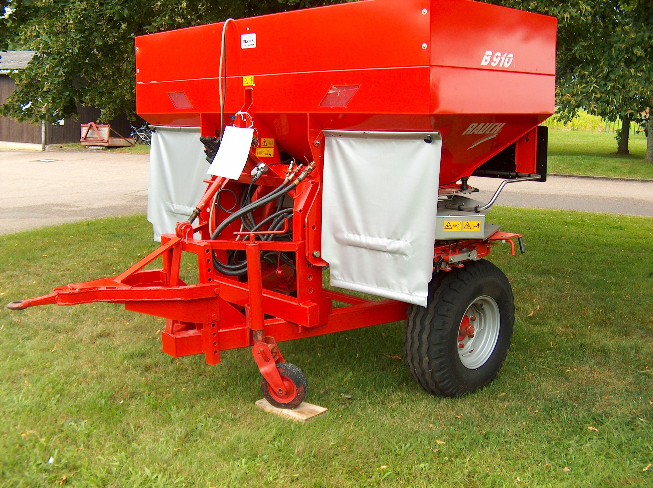 Gezogener einachsiger Kunstdüngerstreuer B 910 von Rauch